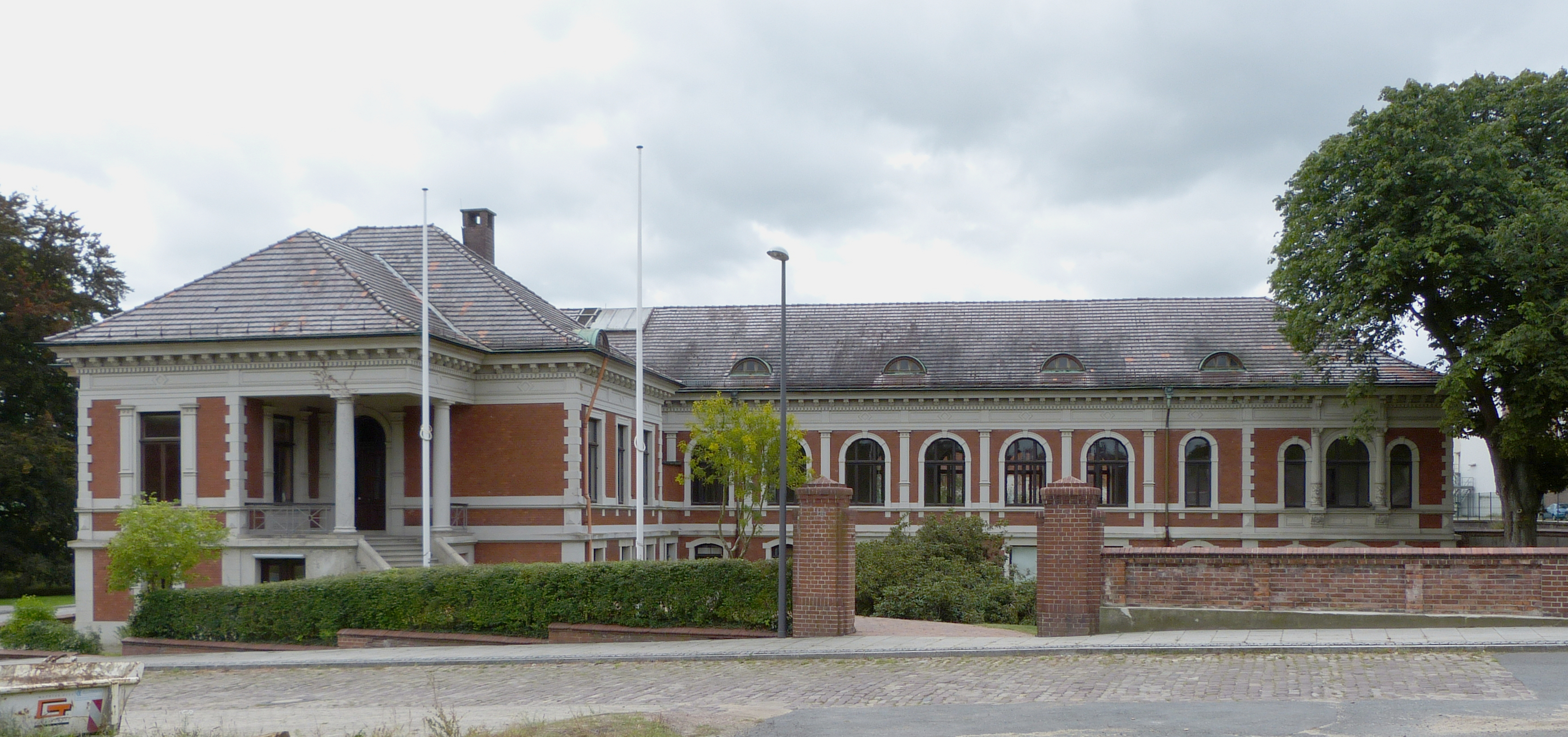 Bremer Wollkämmerei, Haus 107, Kaufmännische Verwaltung in Bremen, Landrat-Christians-Straße 95Das abgebildete Objekt ist ein geschütztes Kulturdenkmal in der Freien Hansestadt Bremen, mit der Nr. 2003 beim Landesamt für Denkmalpflege registriert.